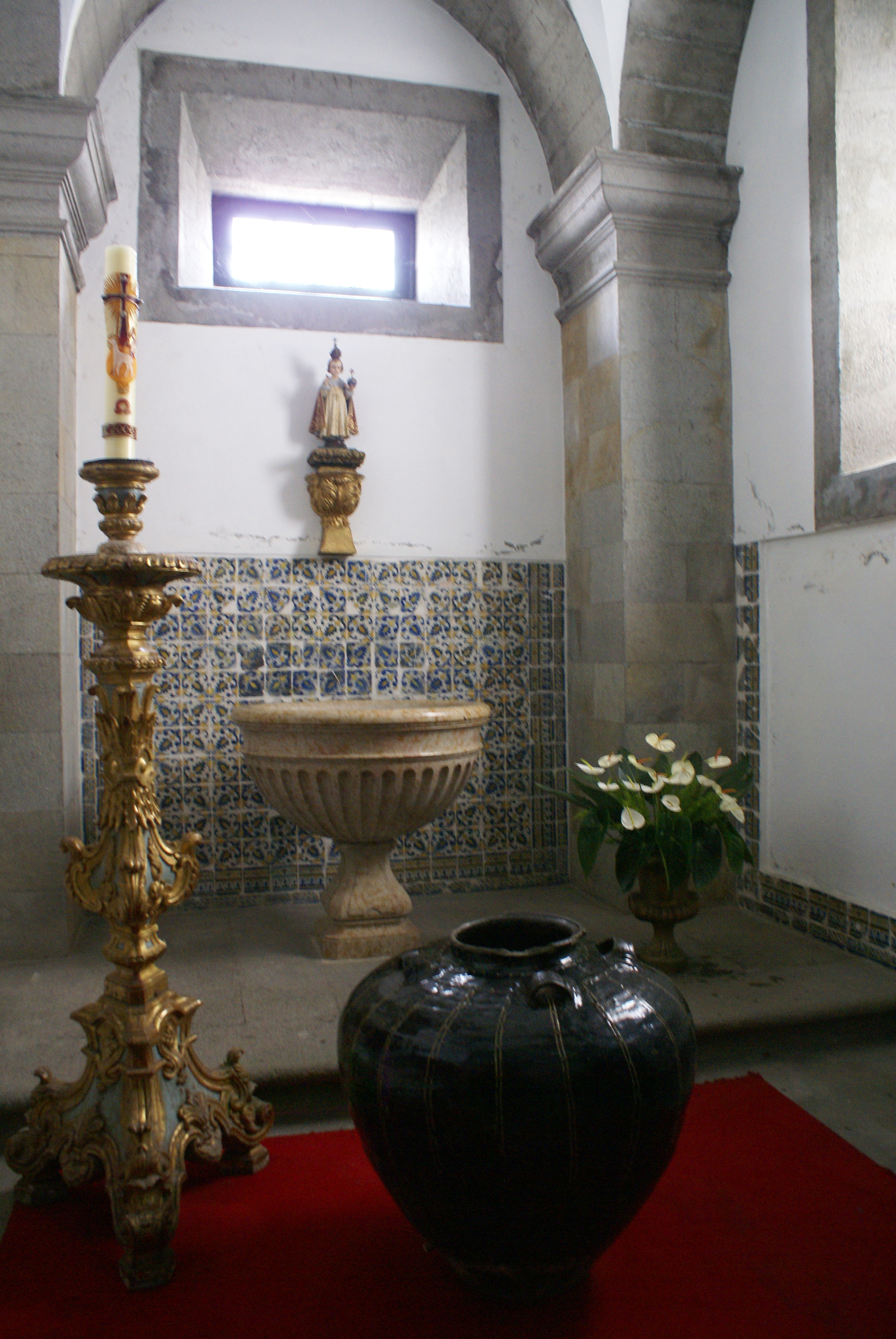 Vaso da Dinastia Ming, colecção da igreja da Sé de Angra do Heroísmo, ilha Terceira, Açores